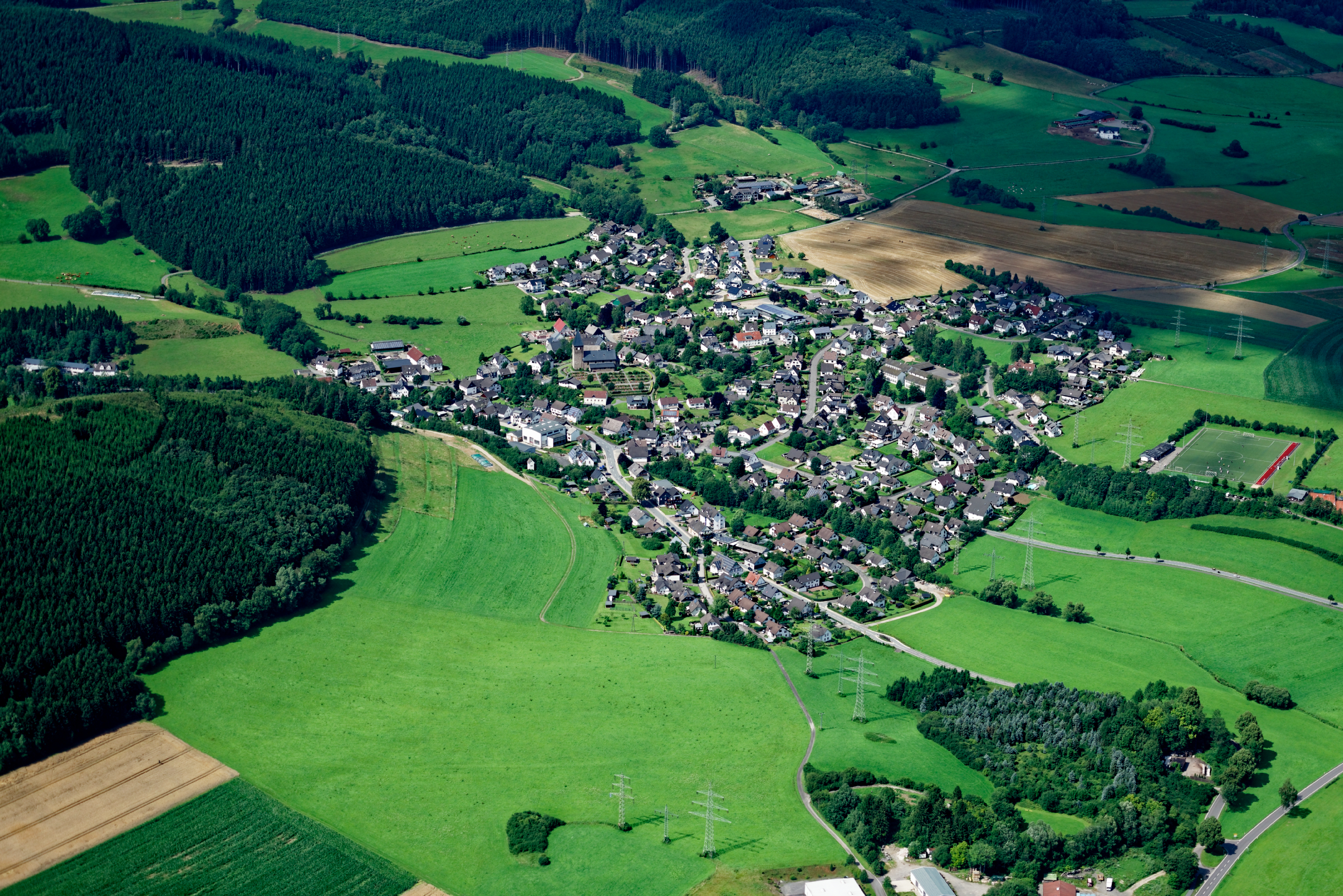 Luftaufnahme: Attendorn-Helden, Blick Richtung Norden, Nordrhein-Westfalen; davor Freileitungstrassen (Bl. 2319, BL 474, Bl. 2408).